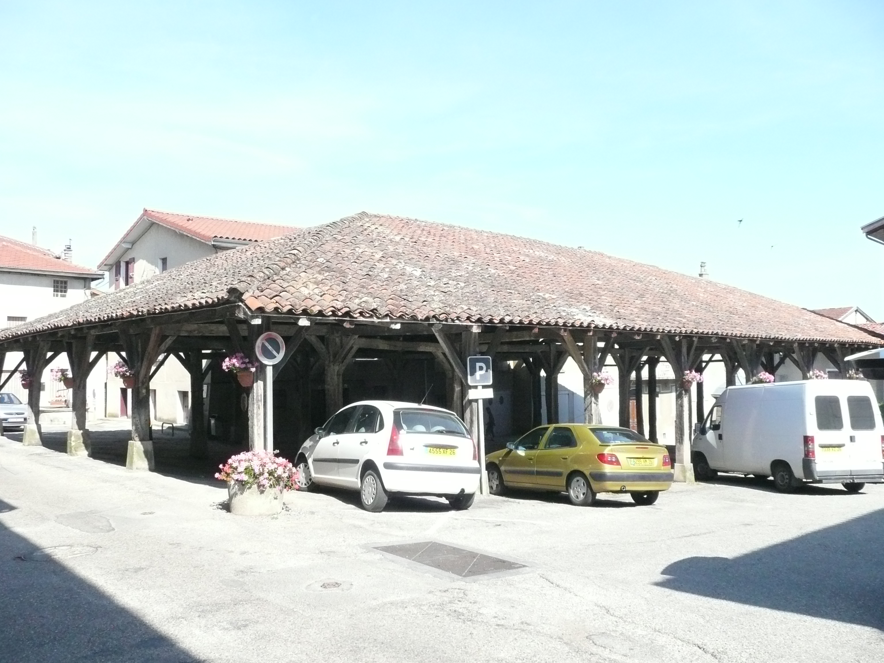 halles du village du Grand-Serre dans la Drôme